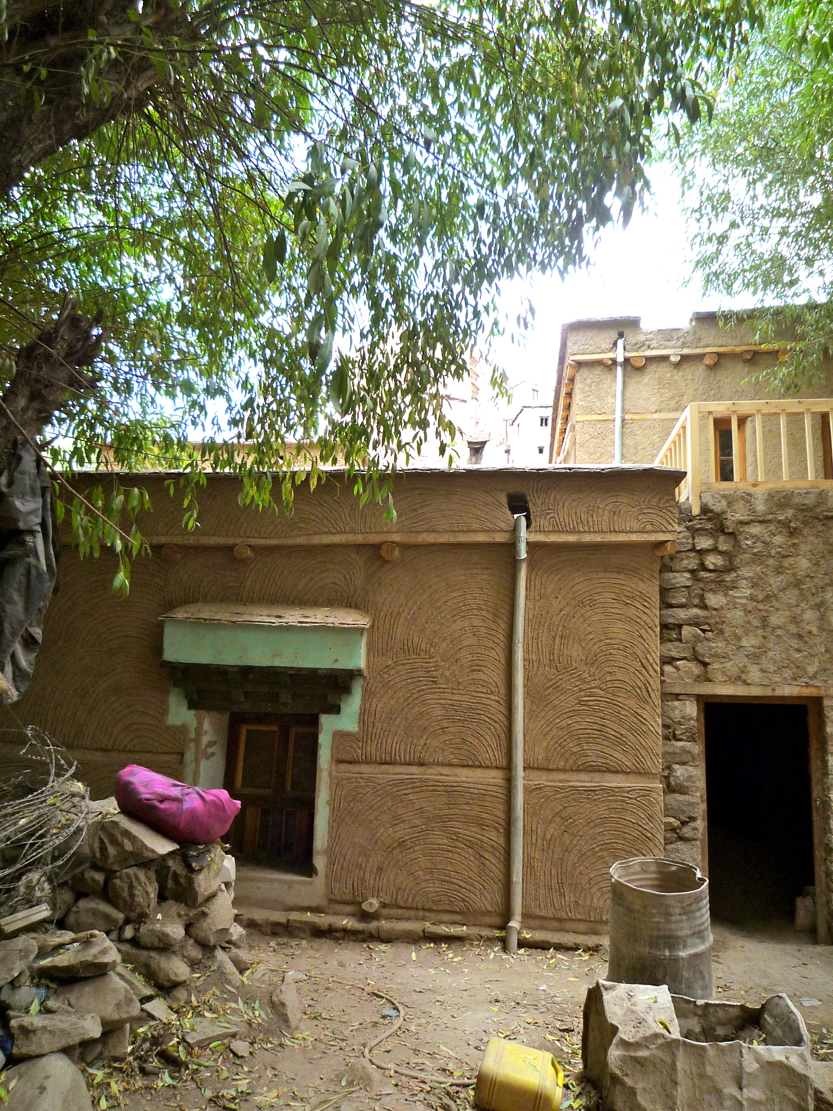 Première mosquée de Leh fondée en 1666